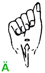 Der Buchstabe 'Ä' im deutschen Fingeralphabet, entsprechend einer Infokarte des Landesverbandes Bayern der Gehörlosen e.V. (